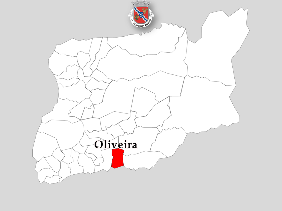 Censos 1864/2011